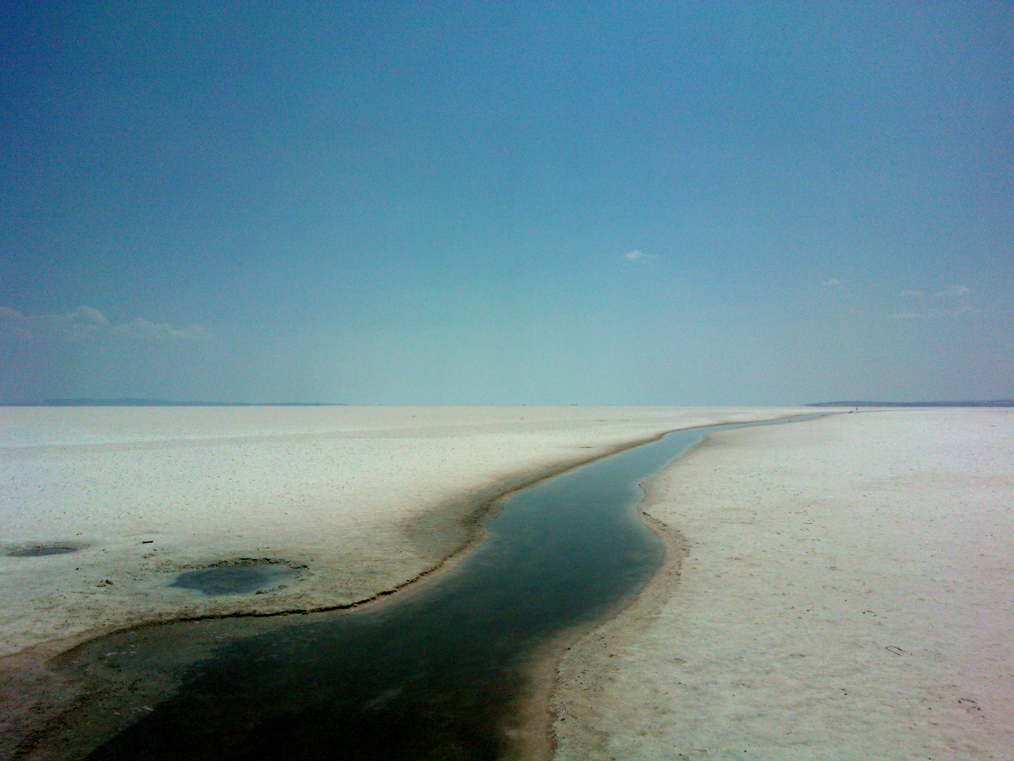 "Lago" salato. 06950 Şereflikoçhisar/Ankara